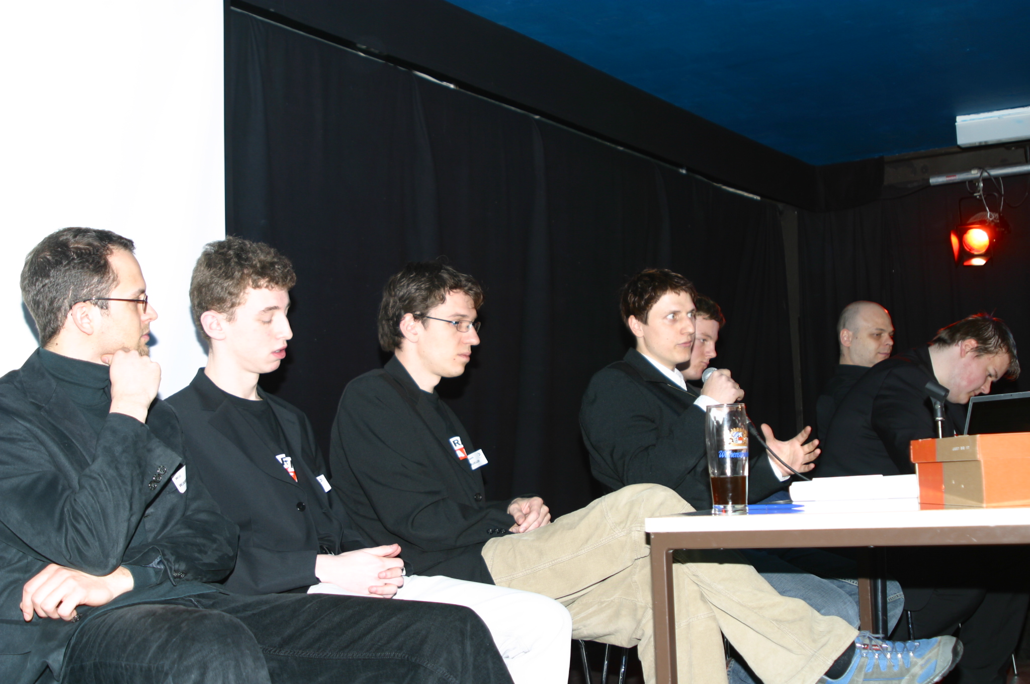 Gründungsversammlung des Landesverbands Bayern der Piratenpartei Deutschland